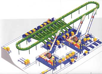 Modelação de sistema de produção